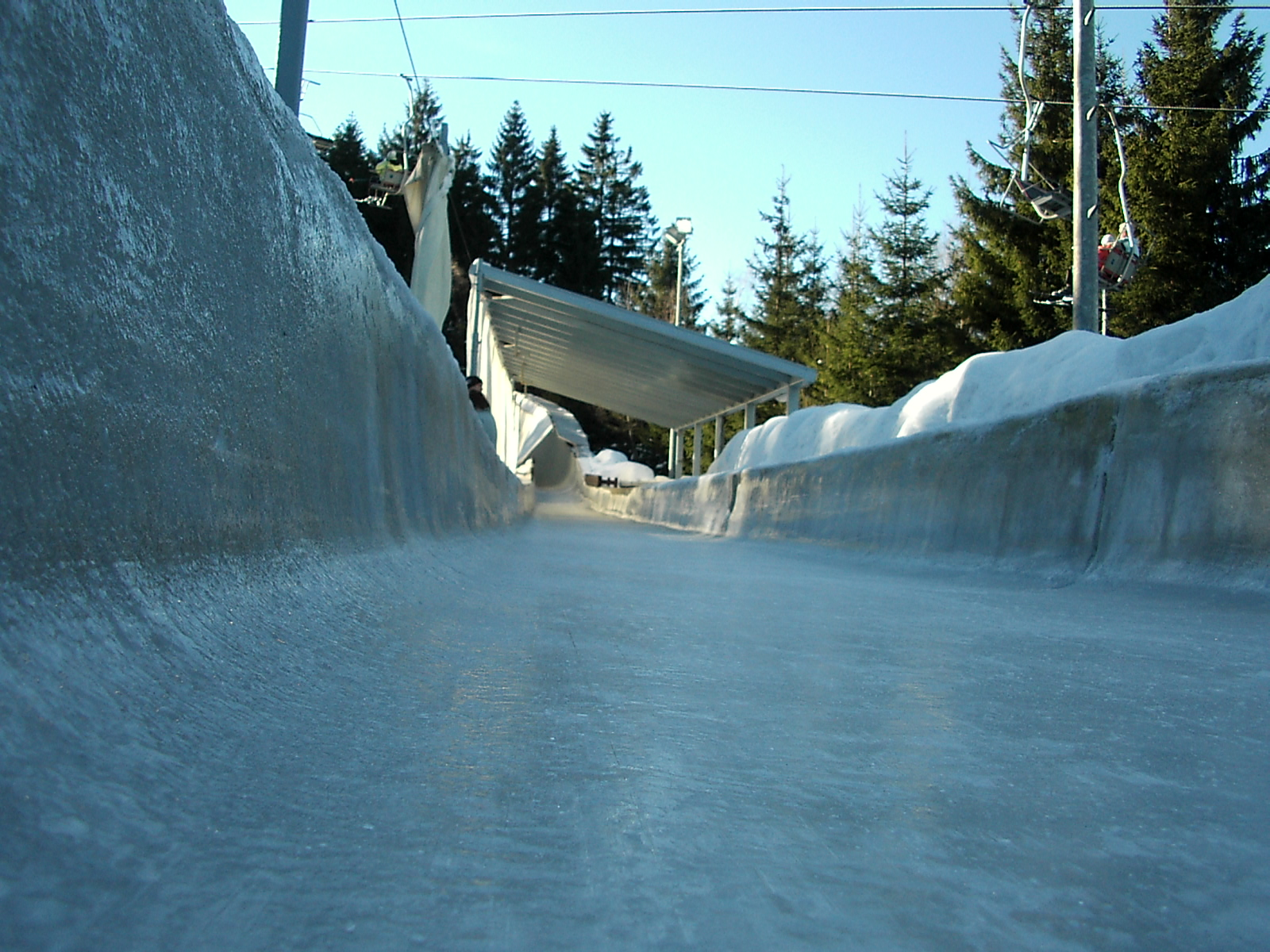 Rennrodelbahn Oberhof - lange Gerade